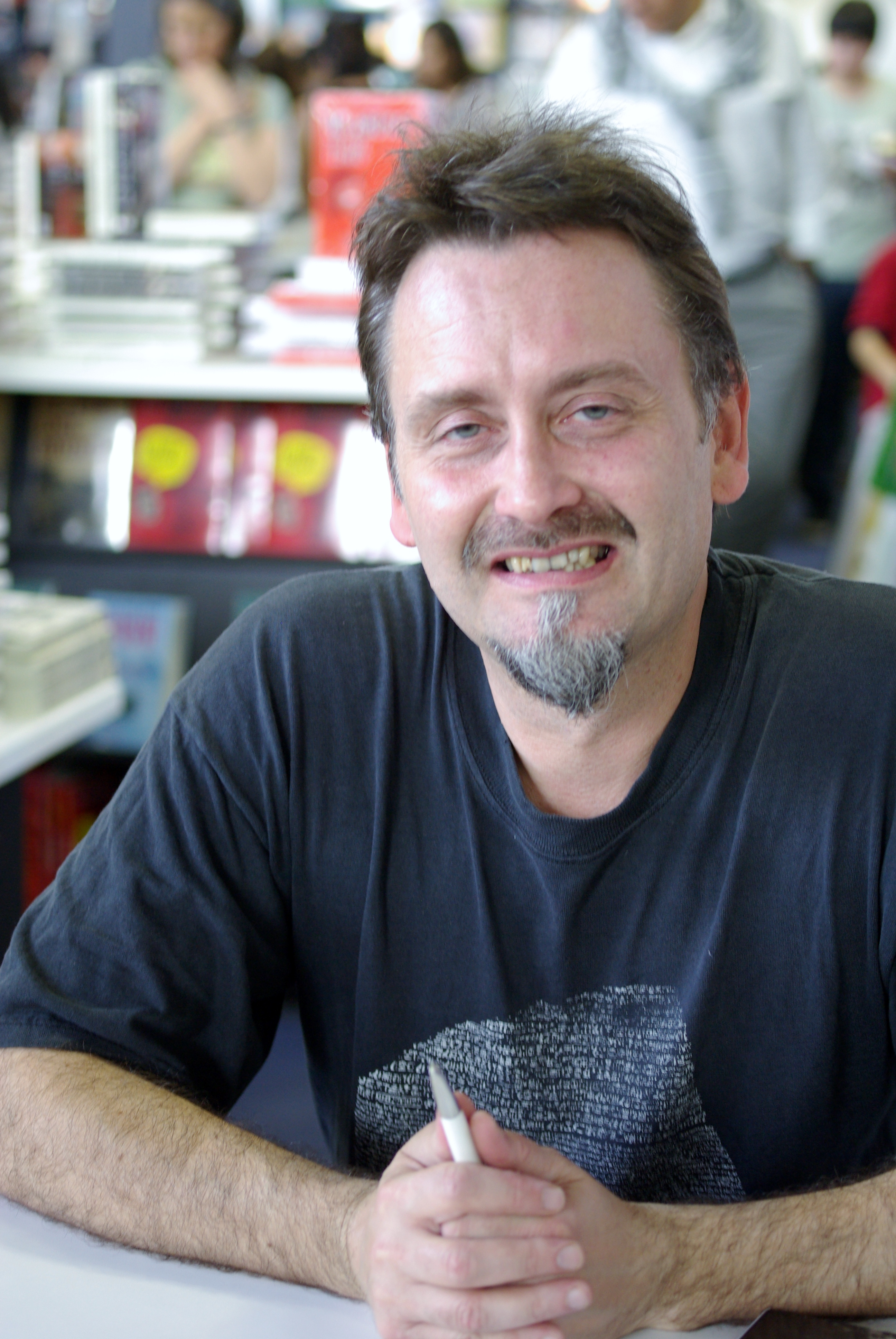 El escritor chileno Carlos Tromben en la Feria Internacional del Libro de Santiago 2016